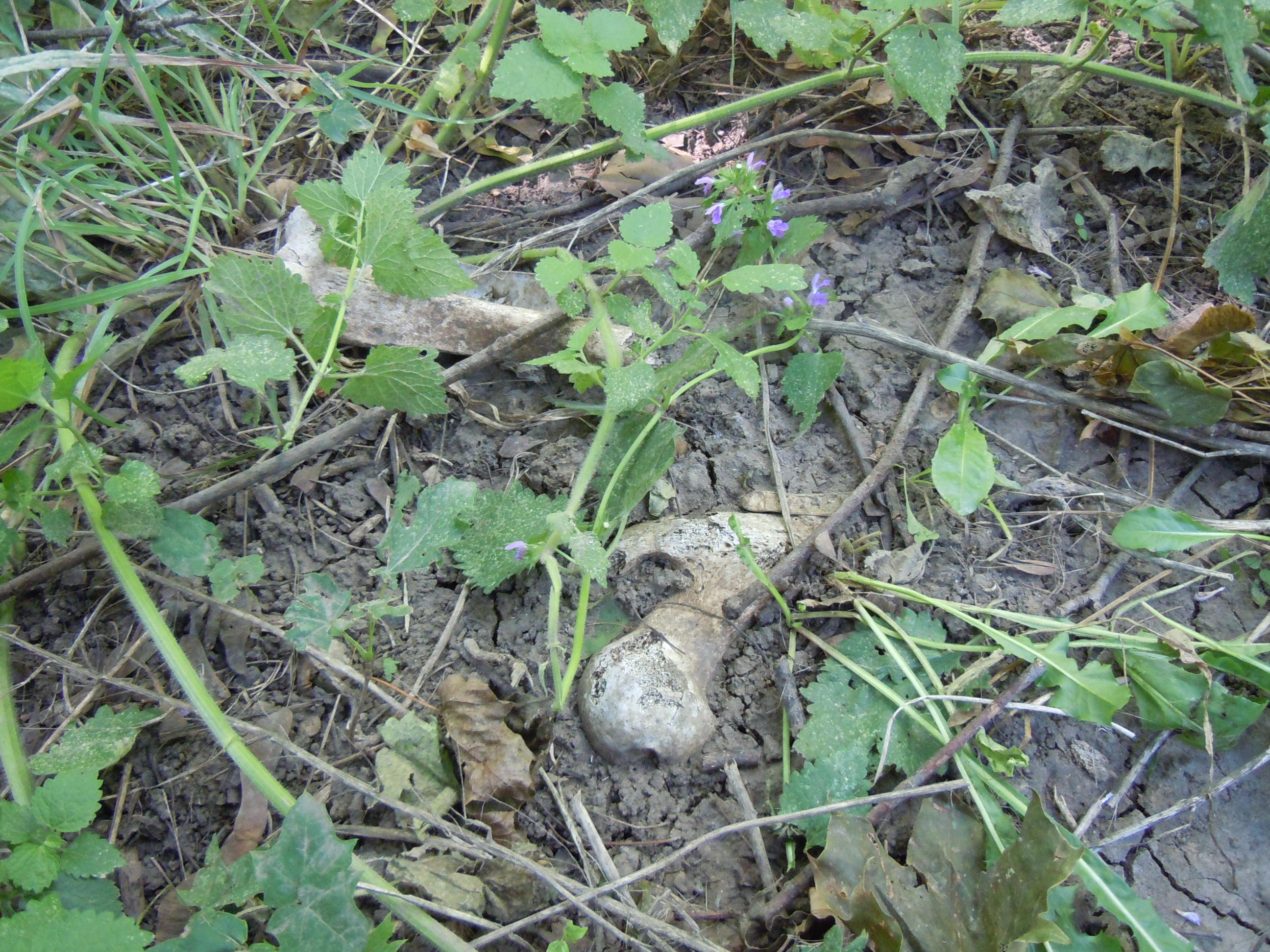 Людські залишки у Преображенському парку (колишній 1-й Християнській цвинтар)